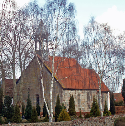 Randlev Kirke, Odder Kommune, Hads Herred, Århus Amt, Denmark